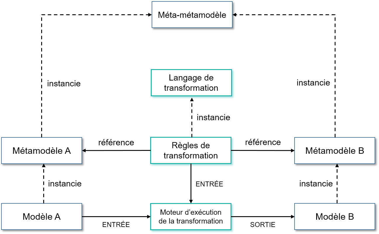 Architecture d'une transformation définie entre deux métamodèles puis utilisée pour mettre à jour un modèle (cible) en fonction d'un modèle (source). Les deux métamodèles ainsi que le métamodèle de QVT sont eux-mêmes représentés par le Meta-Object Facility (MOF).